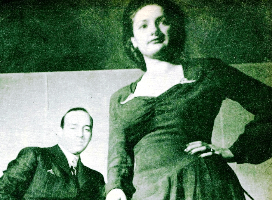 "María Maluenda diputada por el Partido Comunista. María, en primer plano. Igual que ahora que es diputada por el Partido Comunista, la actriz María Maluenda se coloca orgullosamente más adelante que su marido, el actor Roberto Parada."